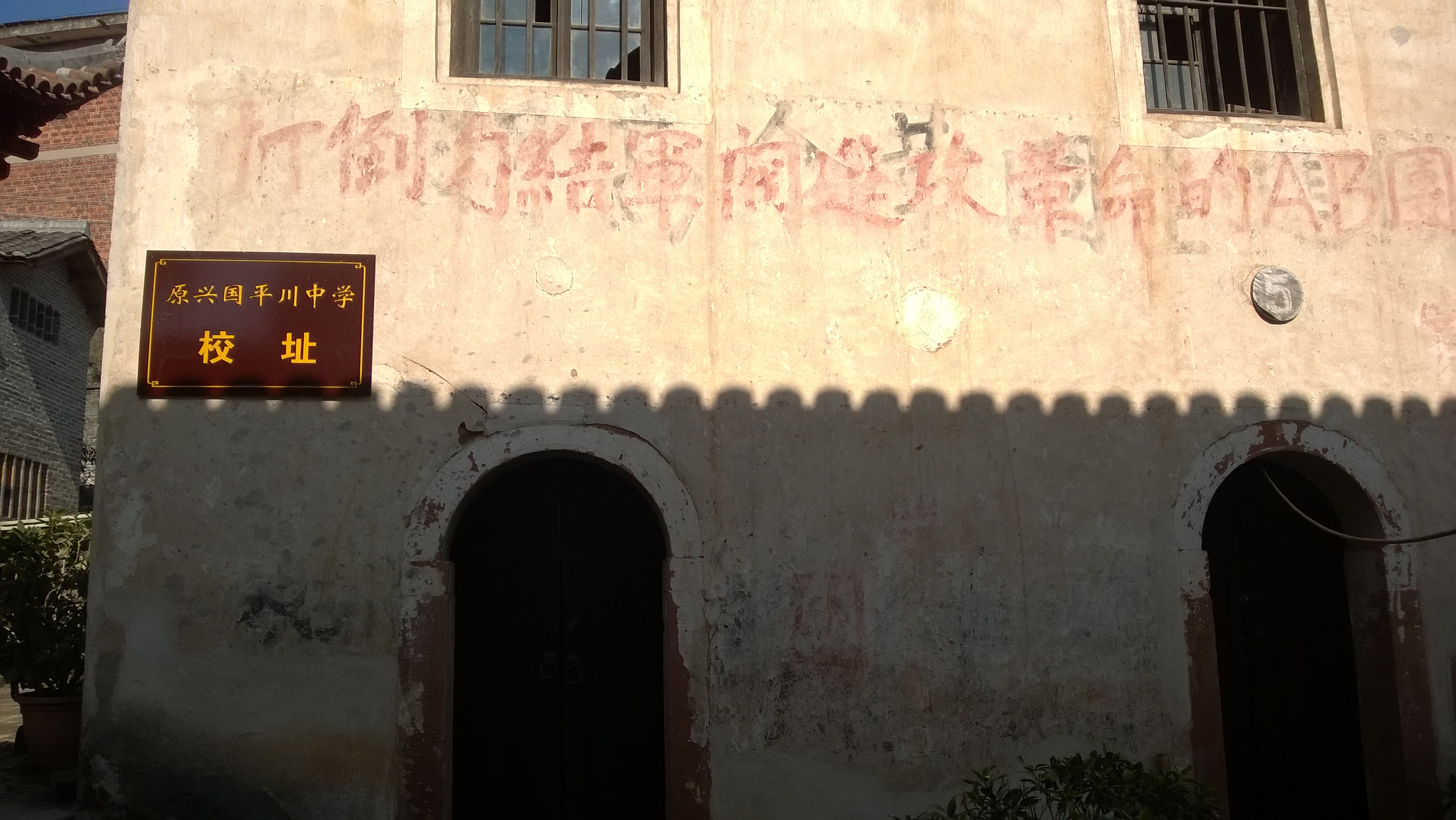 潋江书院内崇圣祠前的边房，为原兴国平川中学校址。